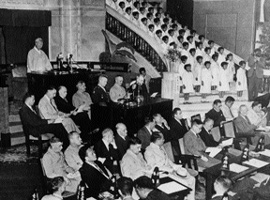 1948년 5월 31일 중앙청에서 거행된 제헌국회 개원식에서 임시의장 이승만의 개회사